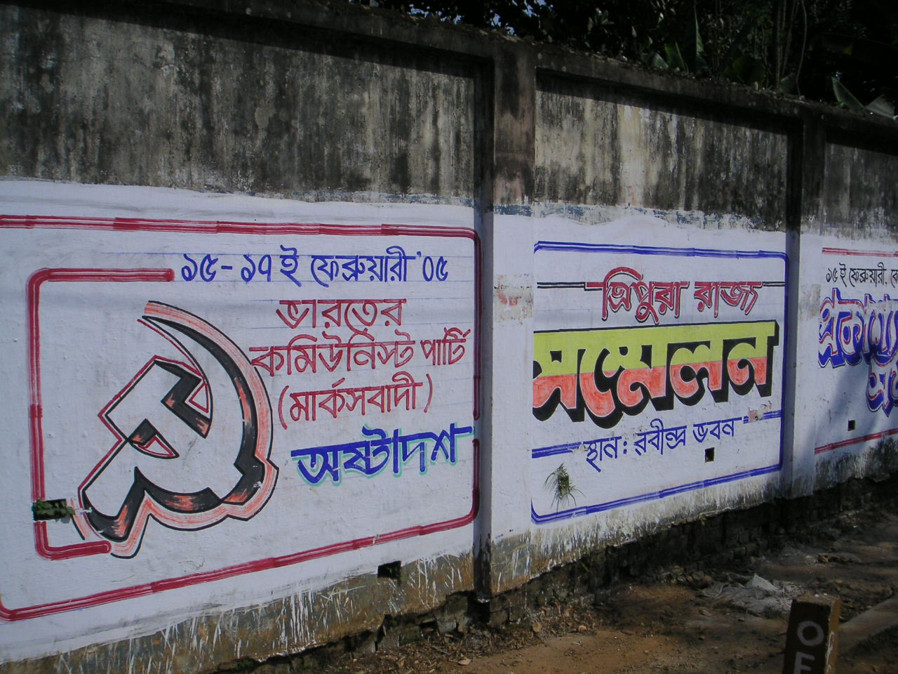 CPI(M) mural in Agartala, Tripura. Photo: Soman